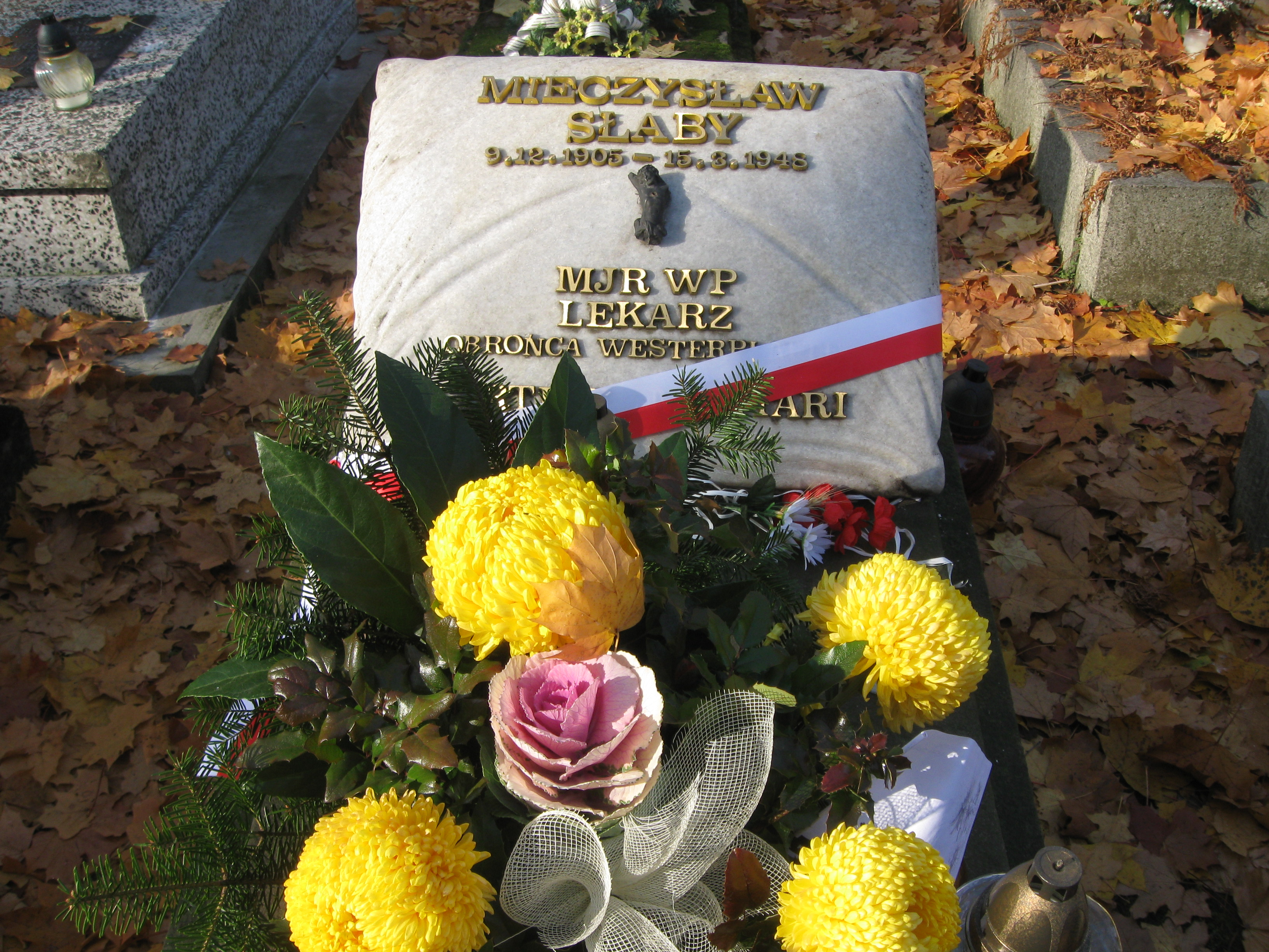 Nagrobek majora Mieczysława Słabego, lekarza, obrońcy Westerplatte na Cmentarzu Wojskowym przy ul.Prandoty w Krakowie.